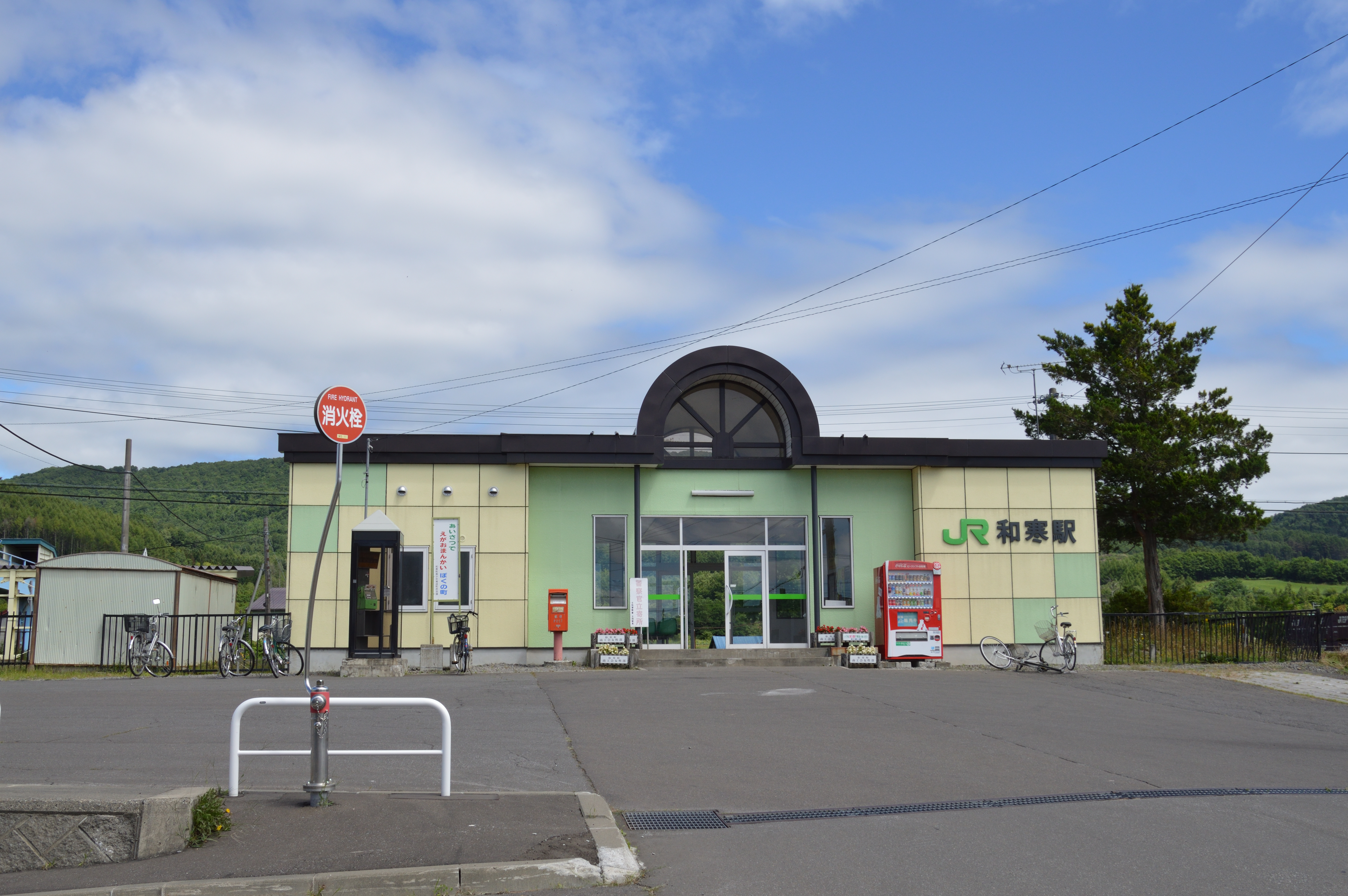 JR北海道宗谷本線和寒駅（2017.08.10） Nikon D3200